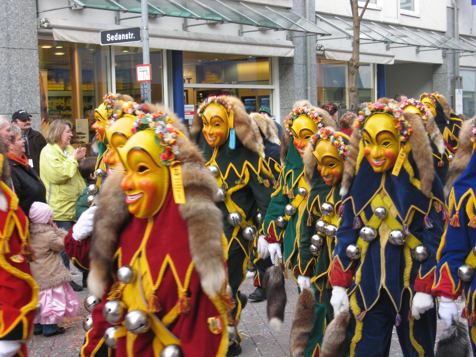 Hafennarren auf dem Umzug in Friedrichshafen 2007